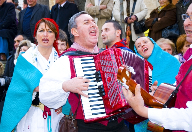 Le vallje sono danze e canti con cui gli albanesi di Calabria rievocano le gesta dell'eroe albanese Giorgio Castriota Scanderbeg. I canti sono di solito cori accompagnati da più strumenti musicali. Il ballo, la vallja, è costituita da una "catena" di Arbëreshë che si tengono per mano o legati da un fazzoletto colorato, cantano e ballano. La vallja si sposta sempre, come un drappello di soldati in battaglia. I balli si snodano nelle vie del paese e terminano nella "piazza delle vallje". Wikipedia: Civita; Parco Nazionale del Pollino. Wikipedia: Giorgio Castriota Scanderbeg; Arbëreshë